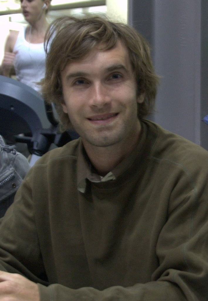 chris sharma & skimble